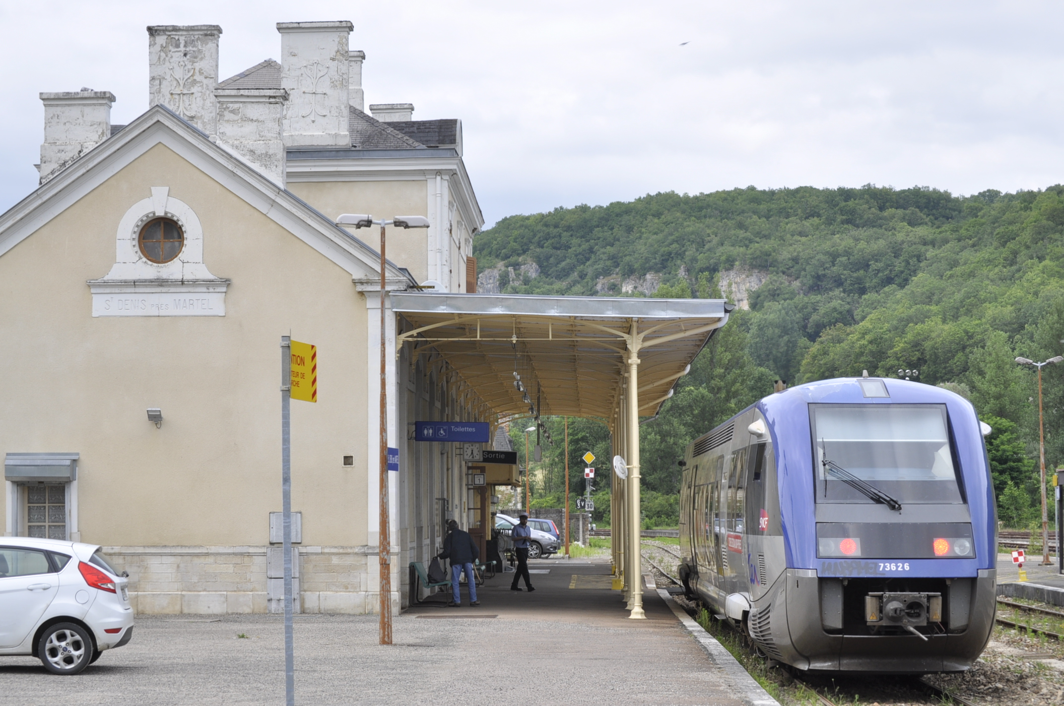 X73500 à quai en gare de Saint-Denis-près-Martel.